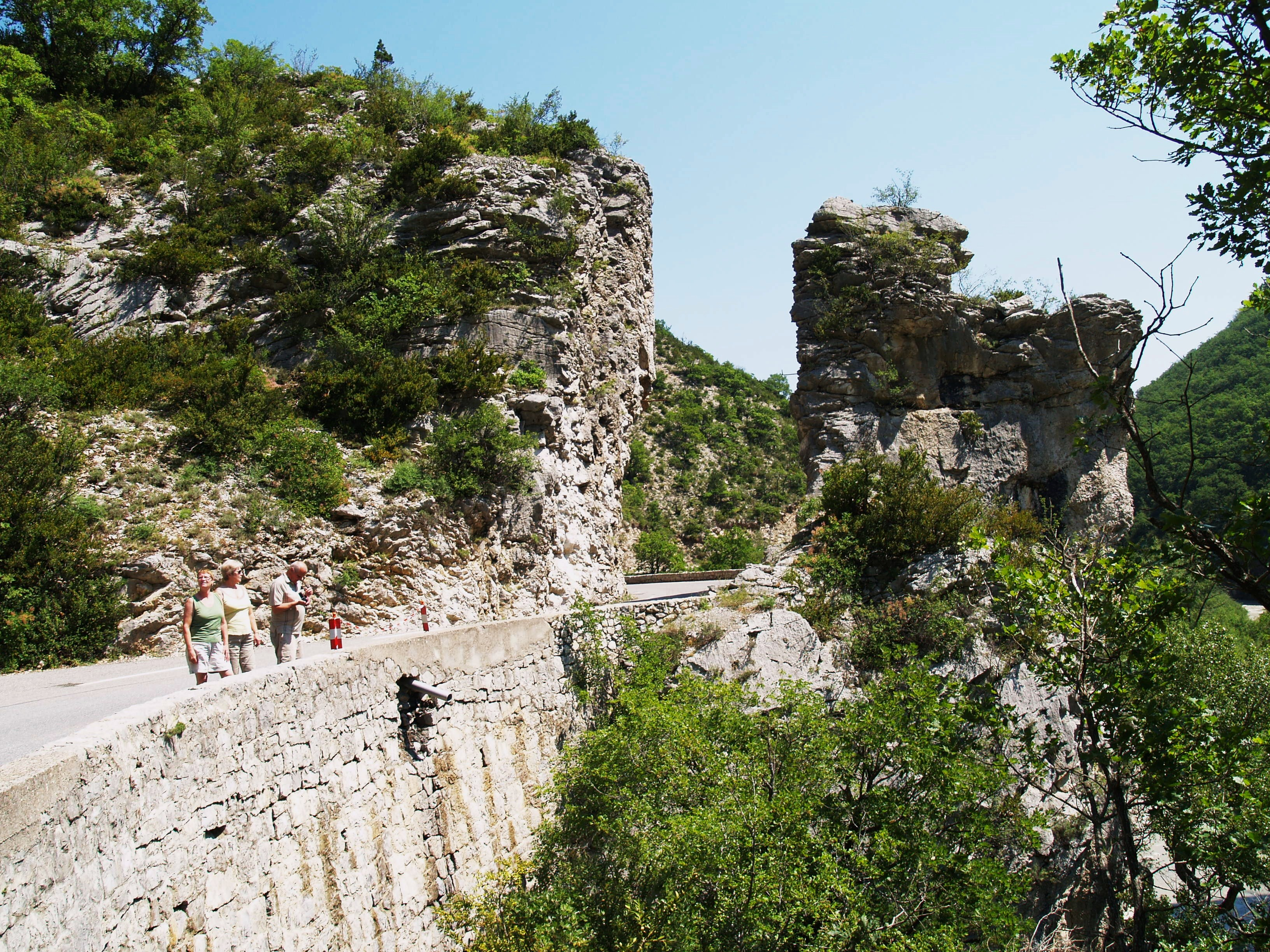 Laborel in Frankrijk : Les Gorges de la Méouge ... moet je gezien hebben !